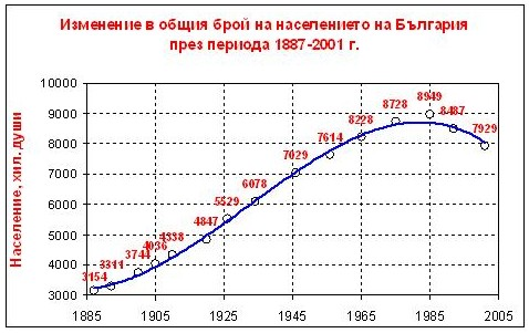 Общ брой на наслението на България съгласно официалните преброявания и тренд на изменението му